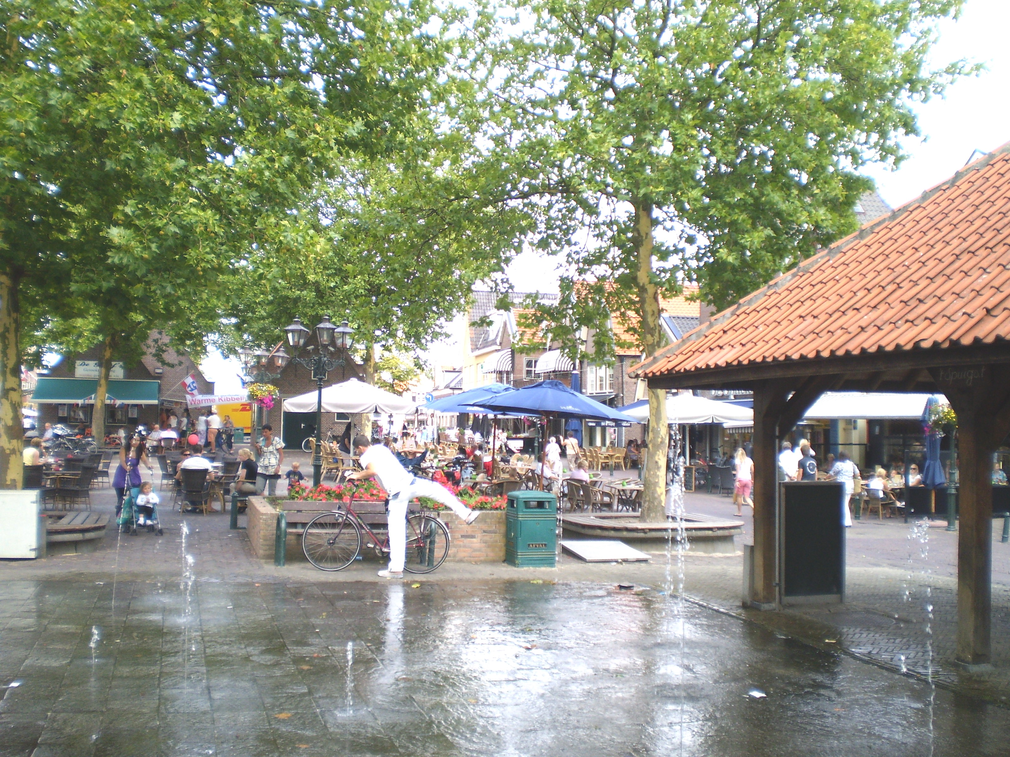 Ofbyld oanbean troch Swarte Kees op 20 augustus 2009